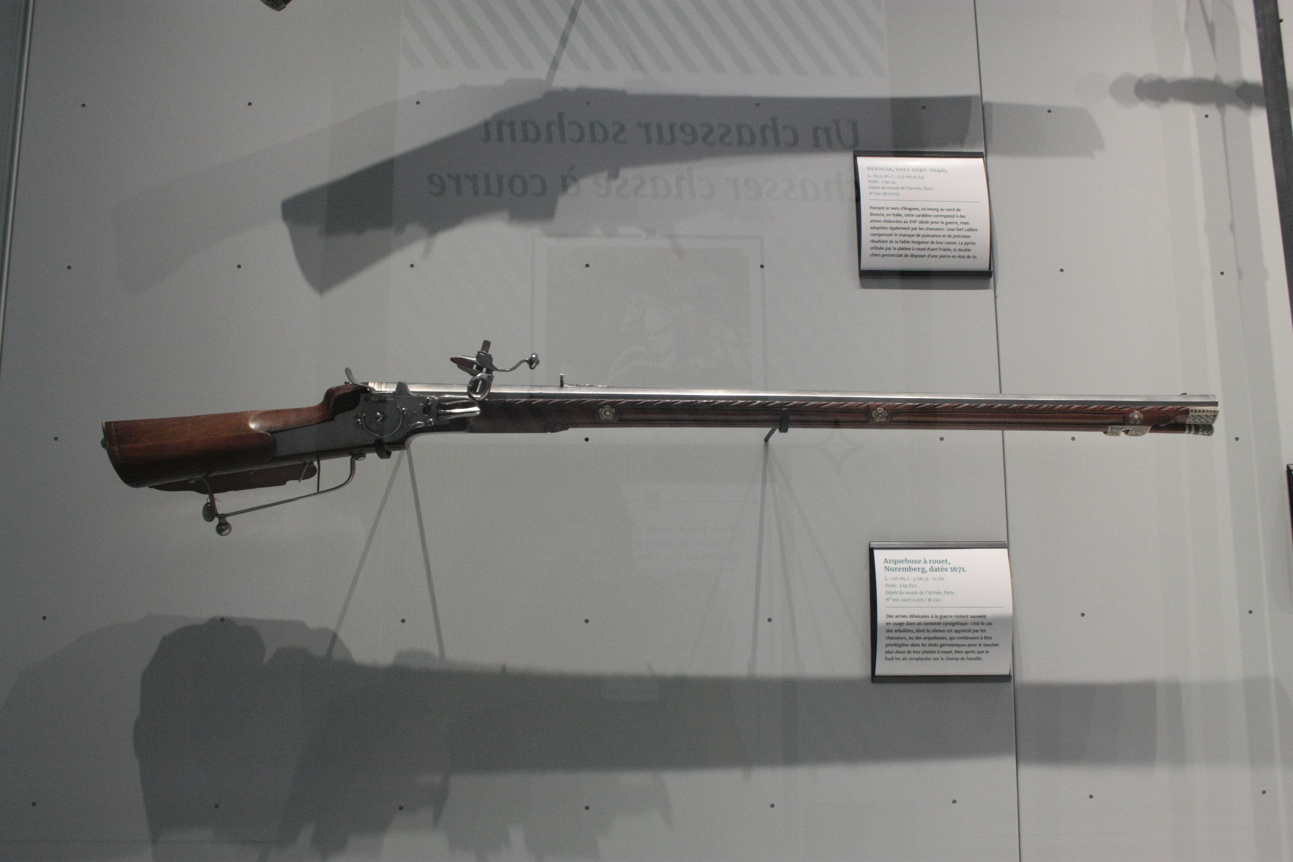 Arquebuse à rouet, Nuremberg, 1671. Dépôt du Musée de l'Armée. Inv : 2007.0.305 / M220